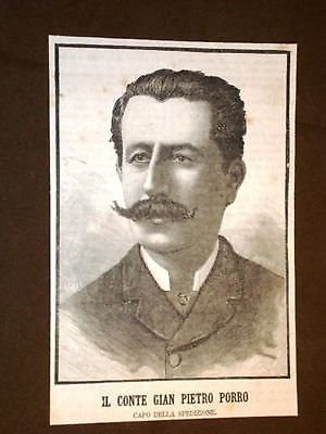 Esploratore italiano